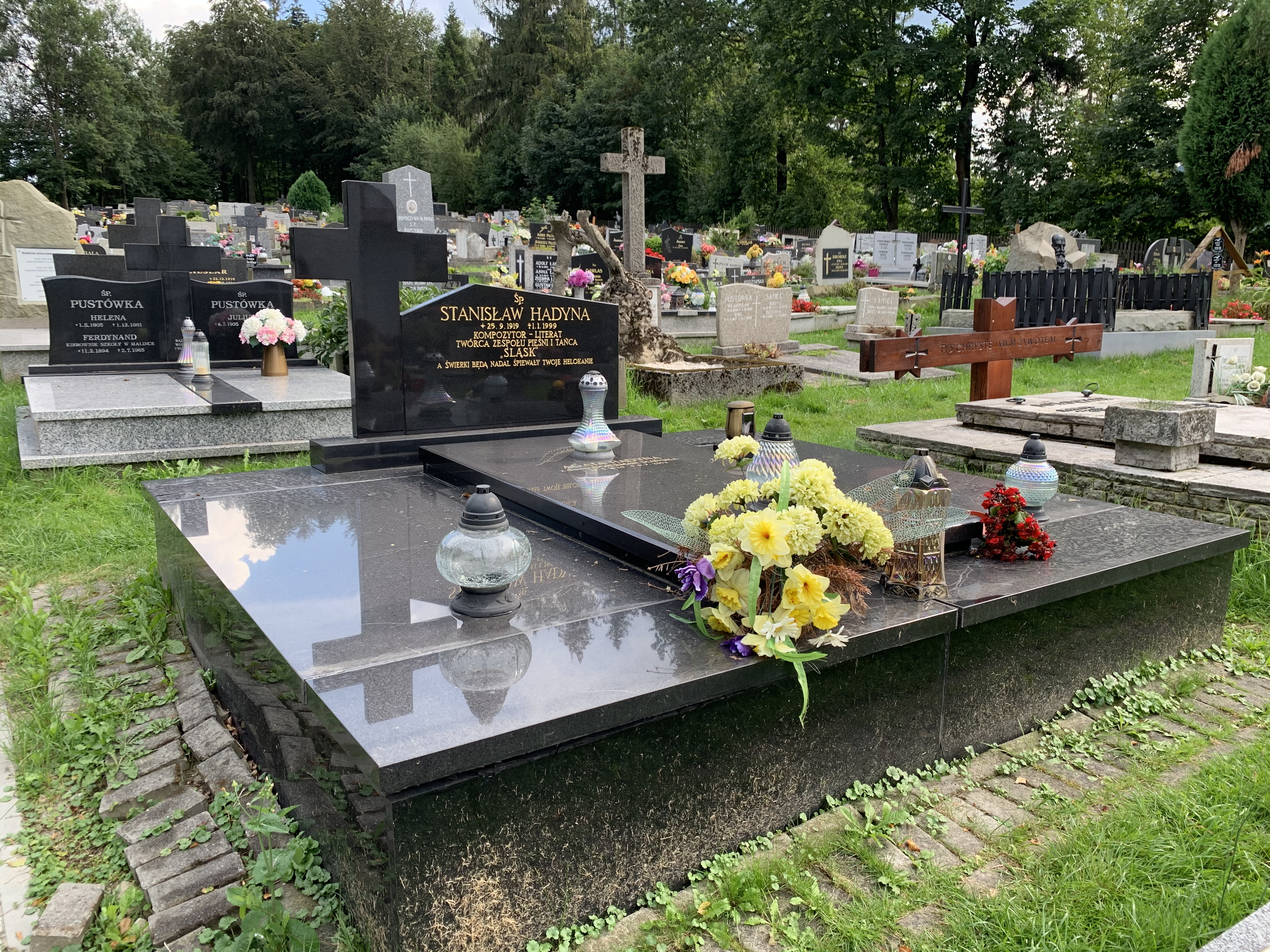 Cmentarz Na Groniczku w Wiśle - nagrobek Stanisława Hadyny, kompozytora, literata, założyciela Zespołu Pieśni i Tańca „Śląsk”